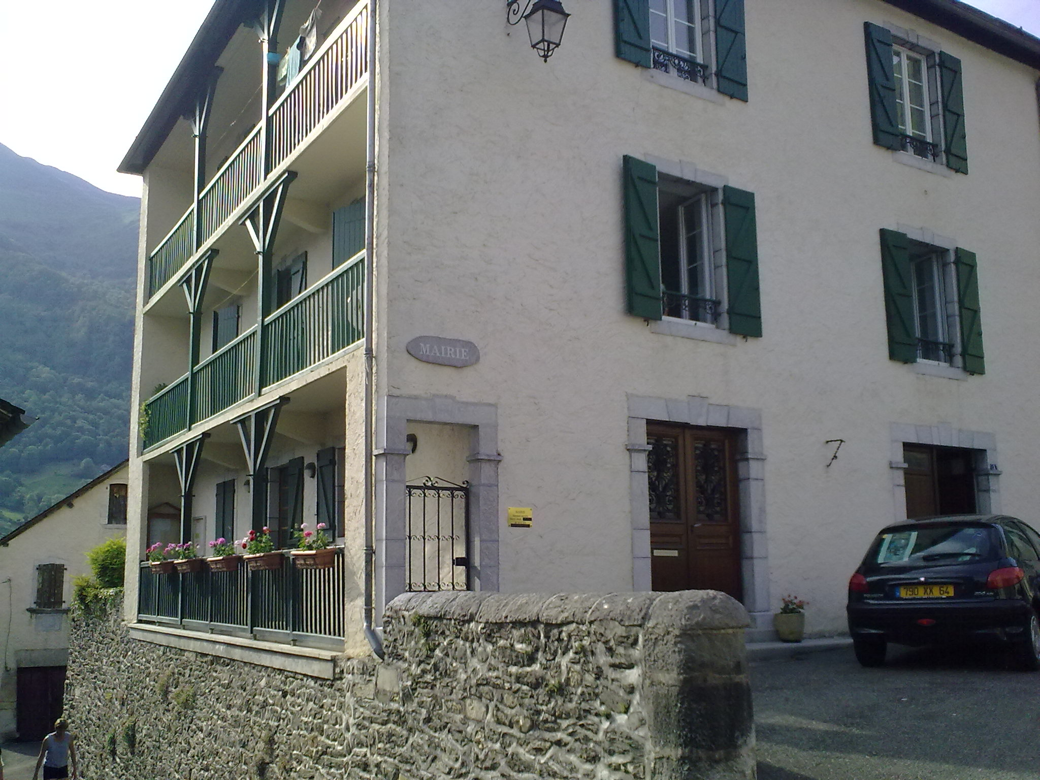 Mairie de Béost.